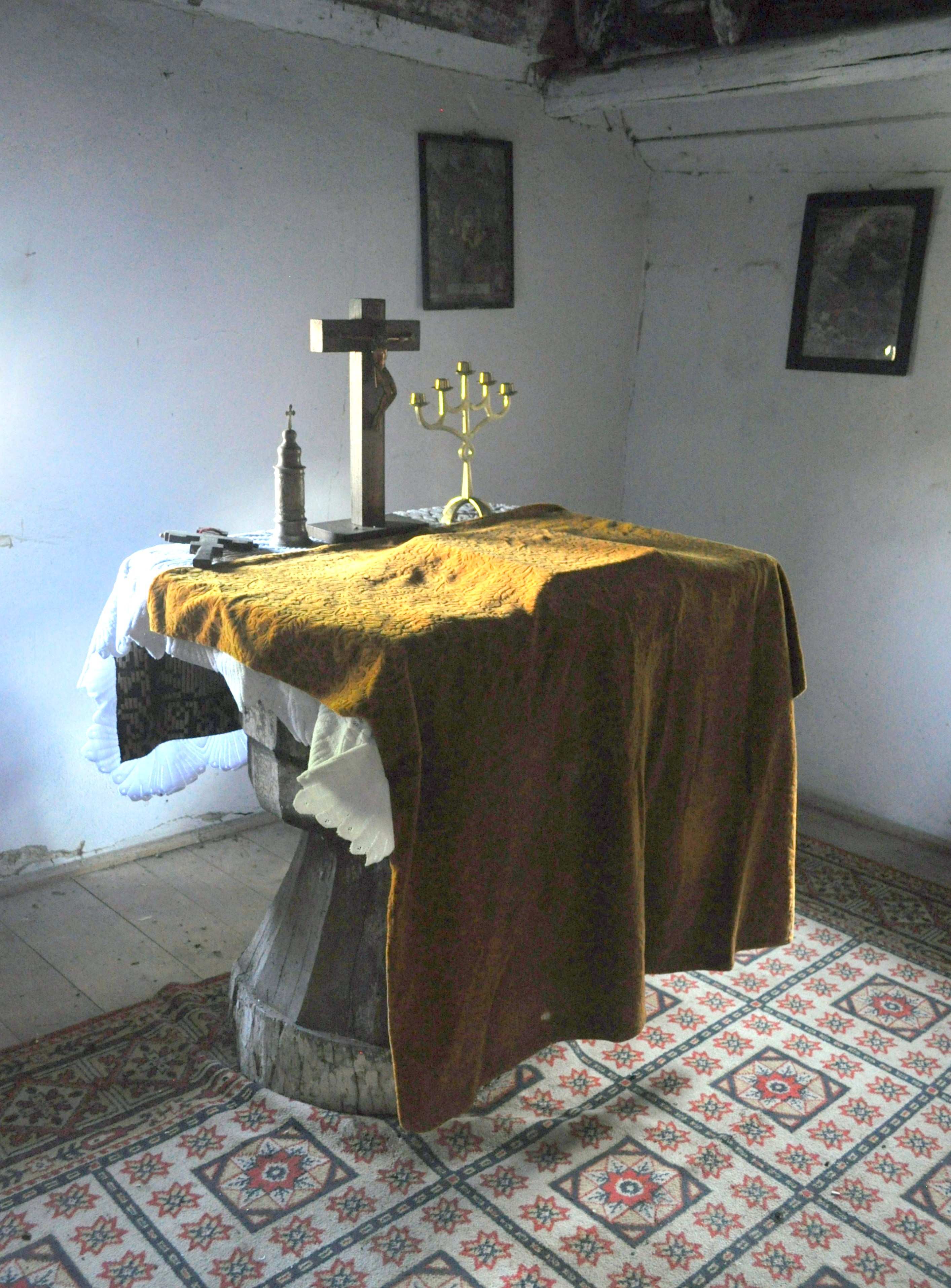 Biserica de lemn „Sfinții Arhangheli Mihail și Gavriil” din Sângătin, comuna Apoldu de Jos, județul Sibiu